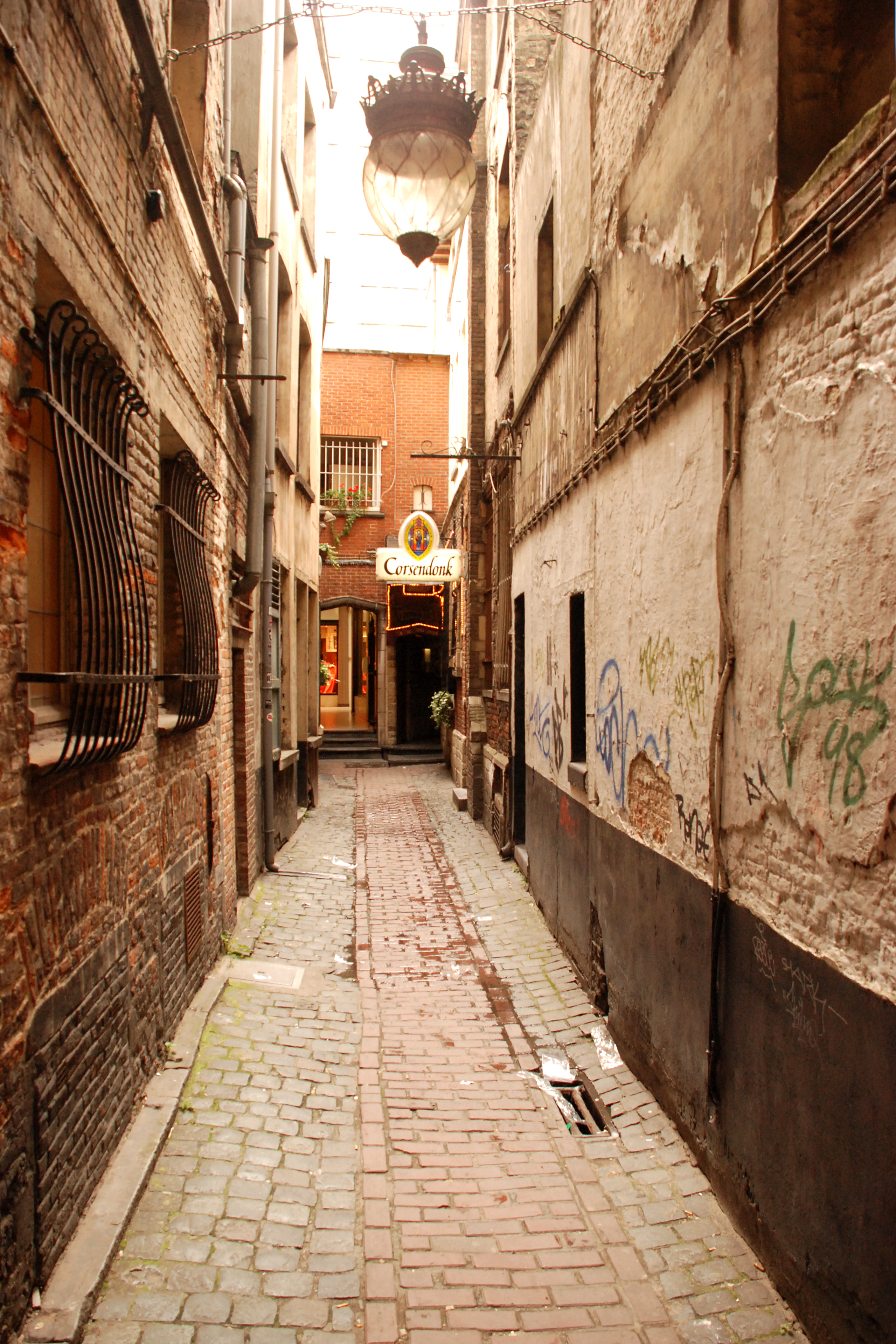 Belgique - Bruxelles - Impasse Saint-Nicolas